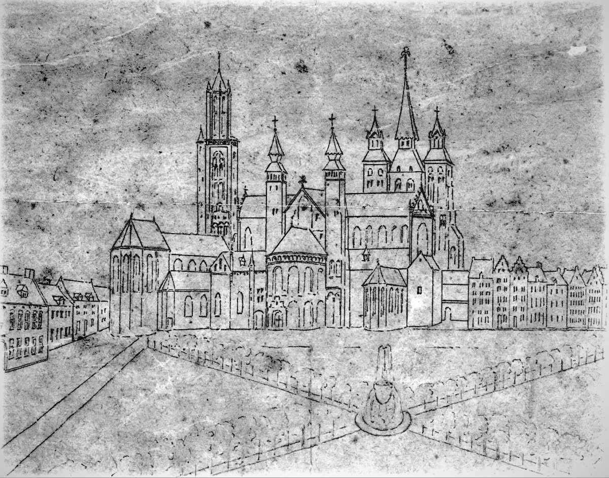 Maastricht: Vrijthof met Sint-Servaaskerk. Reconstructie van het plein, vrij naar een tekening van Remigio Cantagallina uit 1605. Pentekening in Rijksarchief Maastricht.